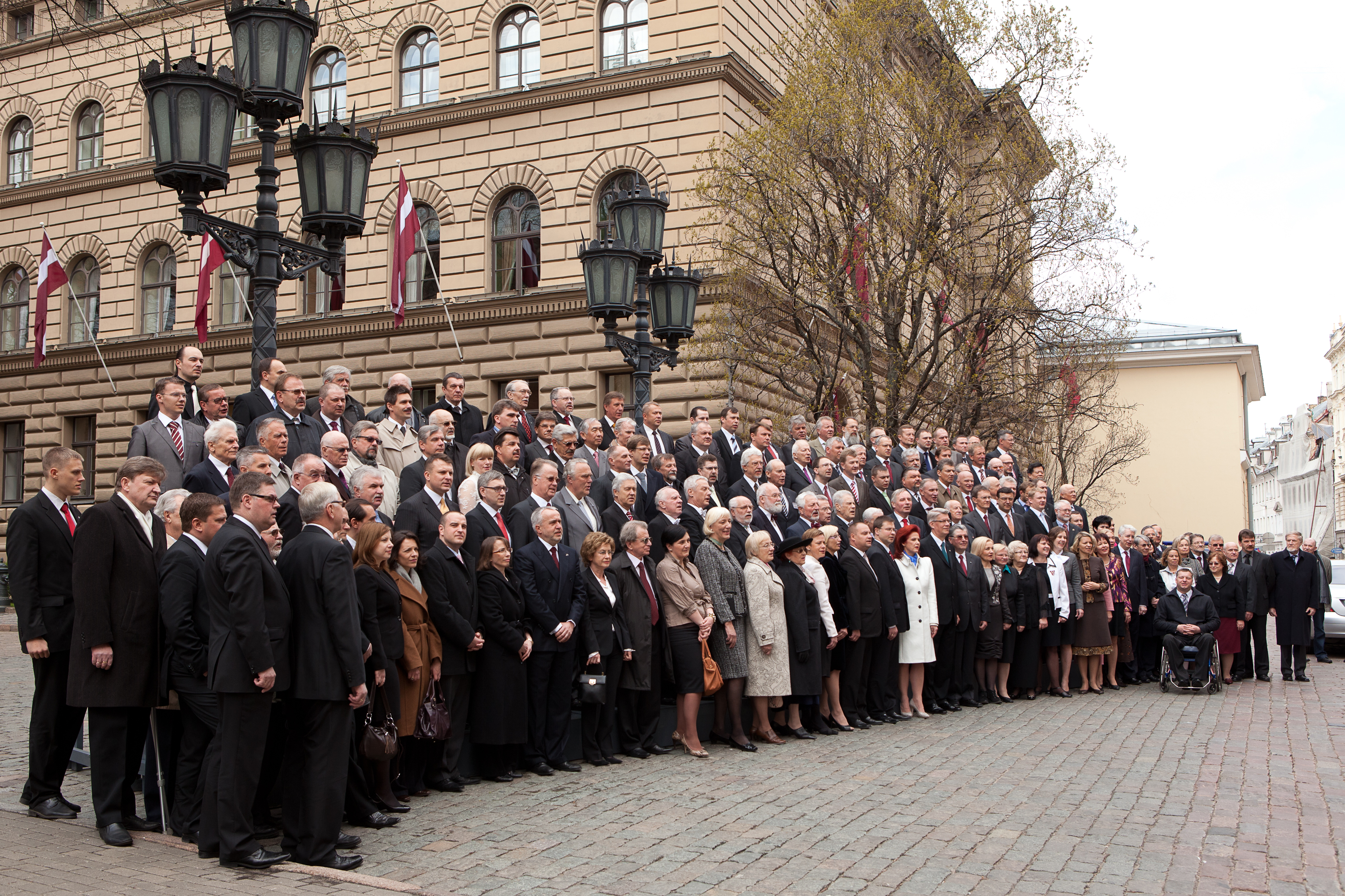 2011.gada 4.maijs. Ikgadējā fotografēšanās pie Saeimas nama par godu Latvijas Republikas Neatkarības pasludināšanas gadadienai. Attēlā: 10.Saeimas deputāti un Augstākās Padomes deputāti, kuri balsoja par Latvijas Republikas neatkarības atjaunošanu. Foto: Saeima